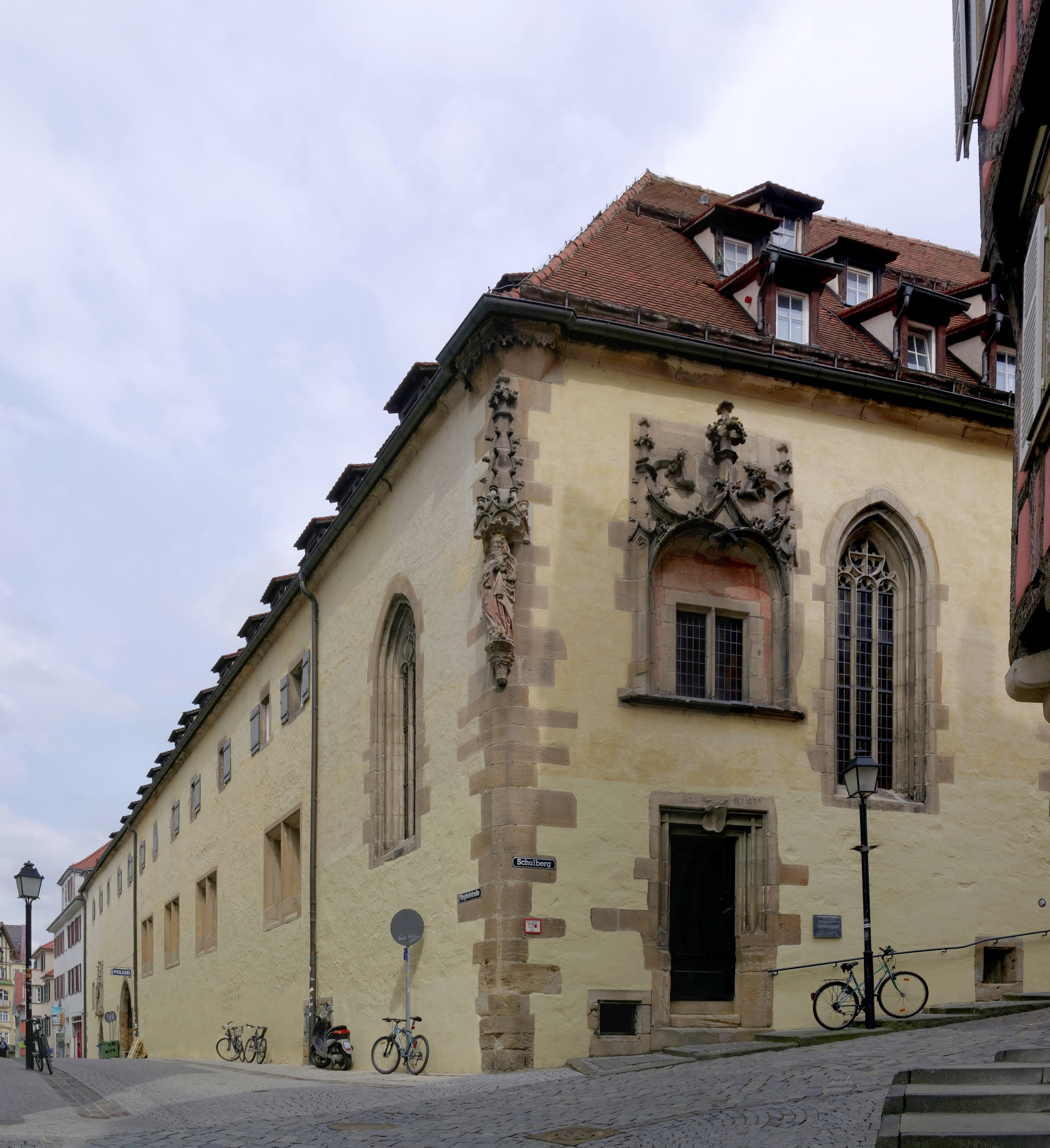 Tübingen, Pfleghof